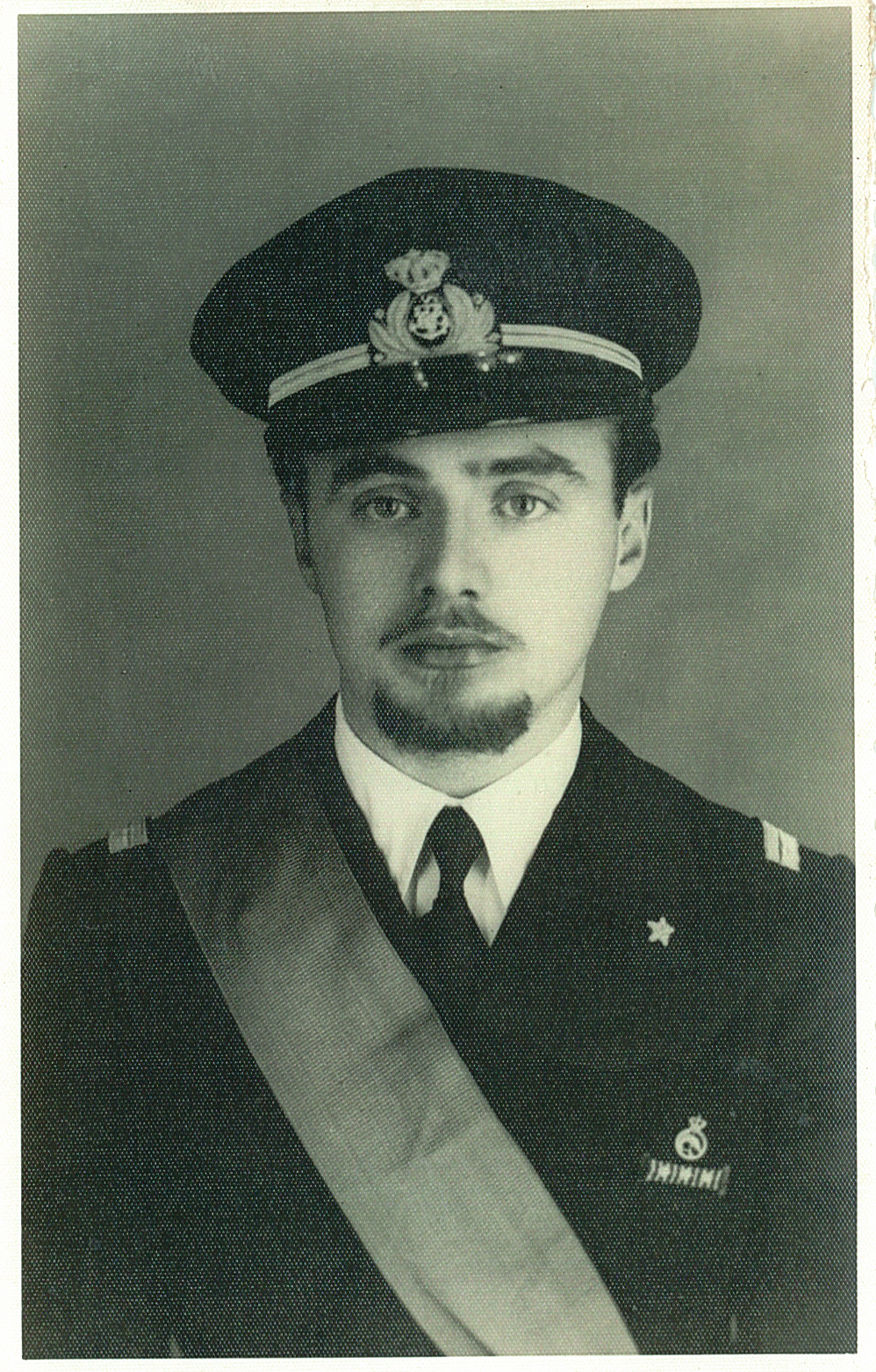 Poldino